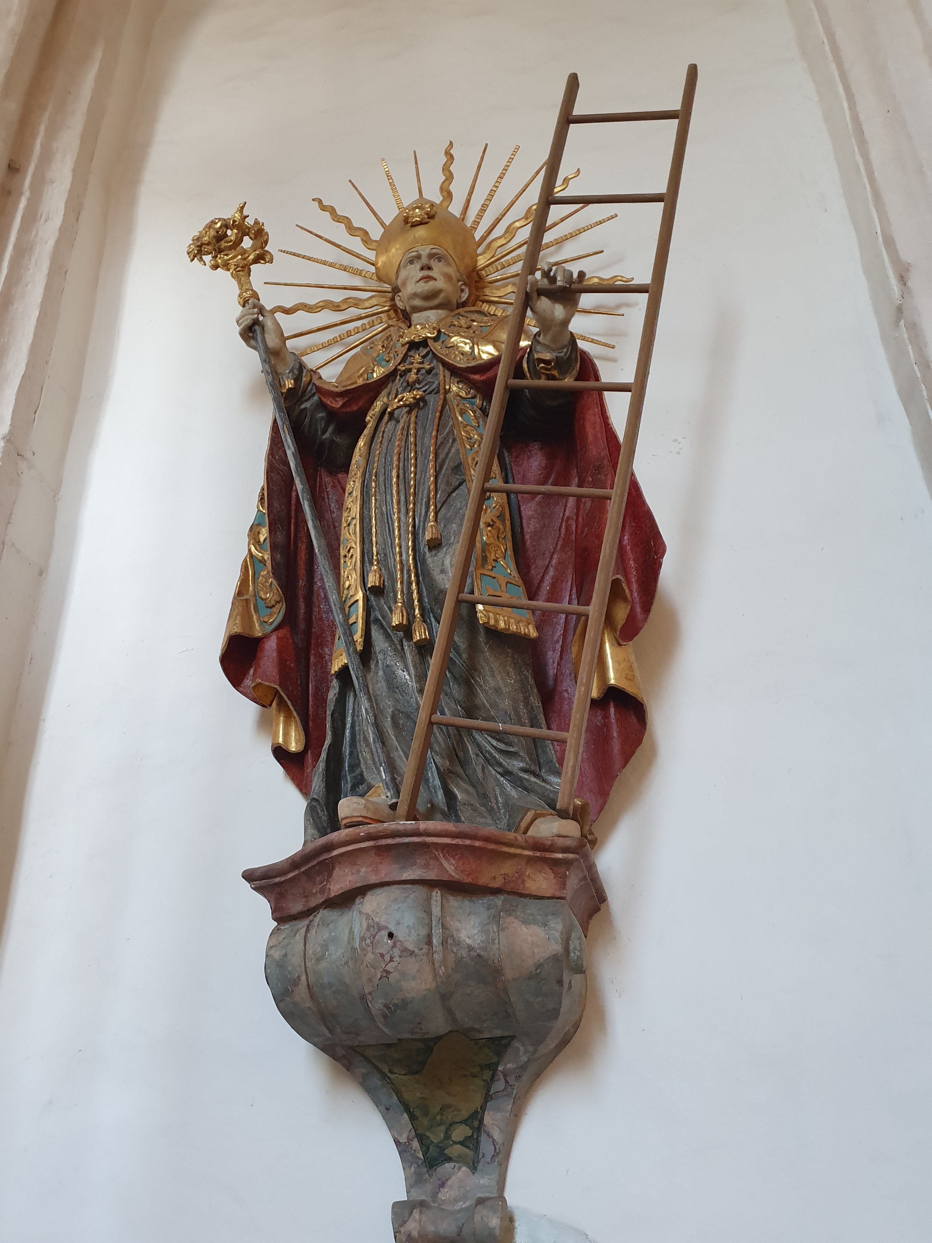 hl. Emmeram als Bischof mit Leiter in er Linken